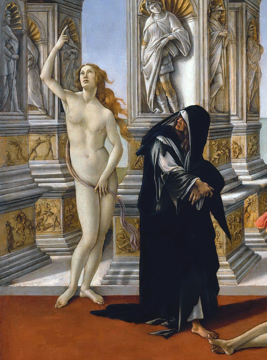 Pintura renacentista